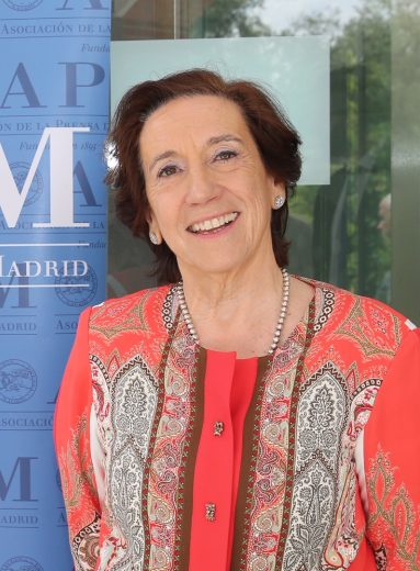 El alcalde de Madrid, José Luis Martínez-Almeida, ha asistido hoy, acompañado de la portavoz del Gobierno Municipal y delegada de Seguridad y Emergencias, Inmaculada Sanz, a la entrega de premios de la Asociación de la Prensa de Madrid, que este año celebra su 80 edición.